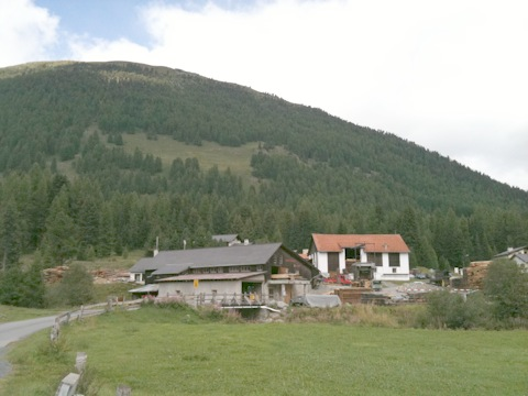 Alte Sägerei (La Resgia) in Chapella, zu S-chanf gehörig